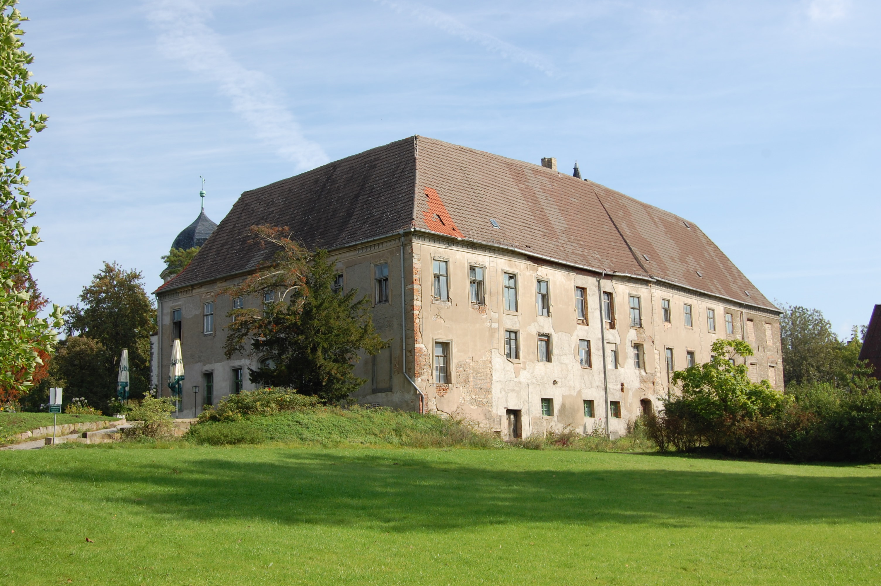 Schloss Dieskau von der Parkseite aus